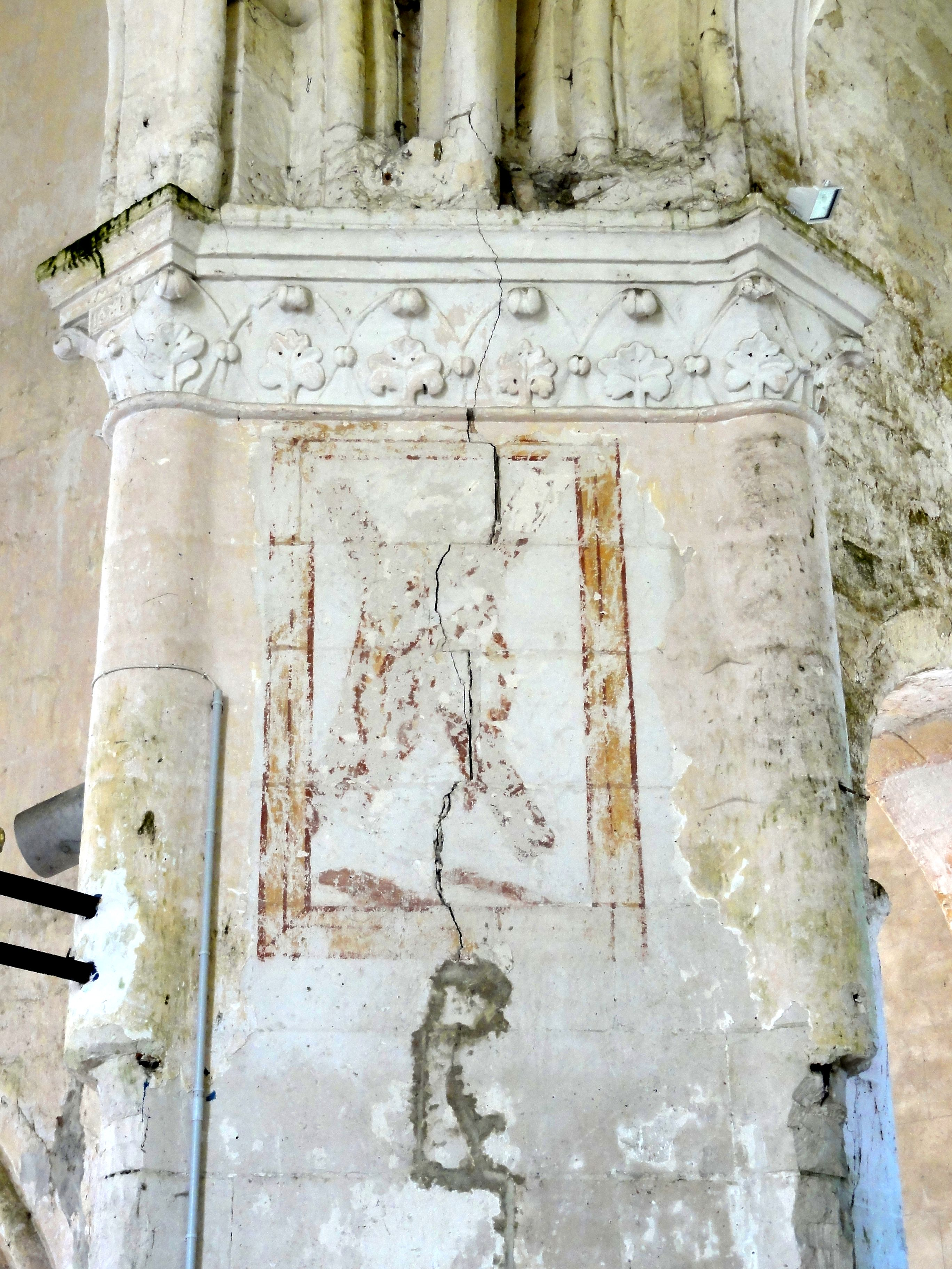 Croisée du transept, pile nord-ouest, côté est.